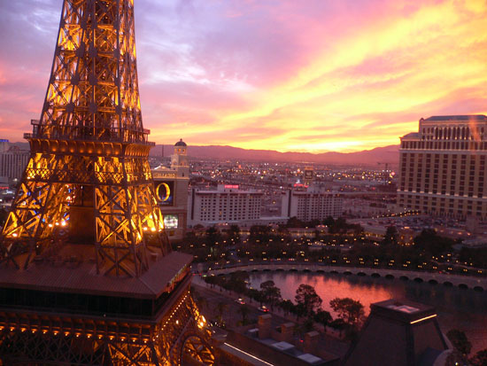 An idyllic Vegas sunset.sunset